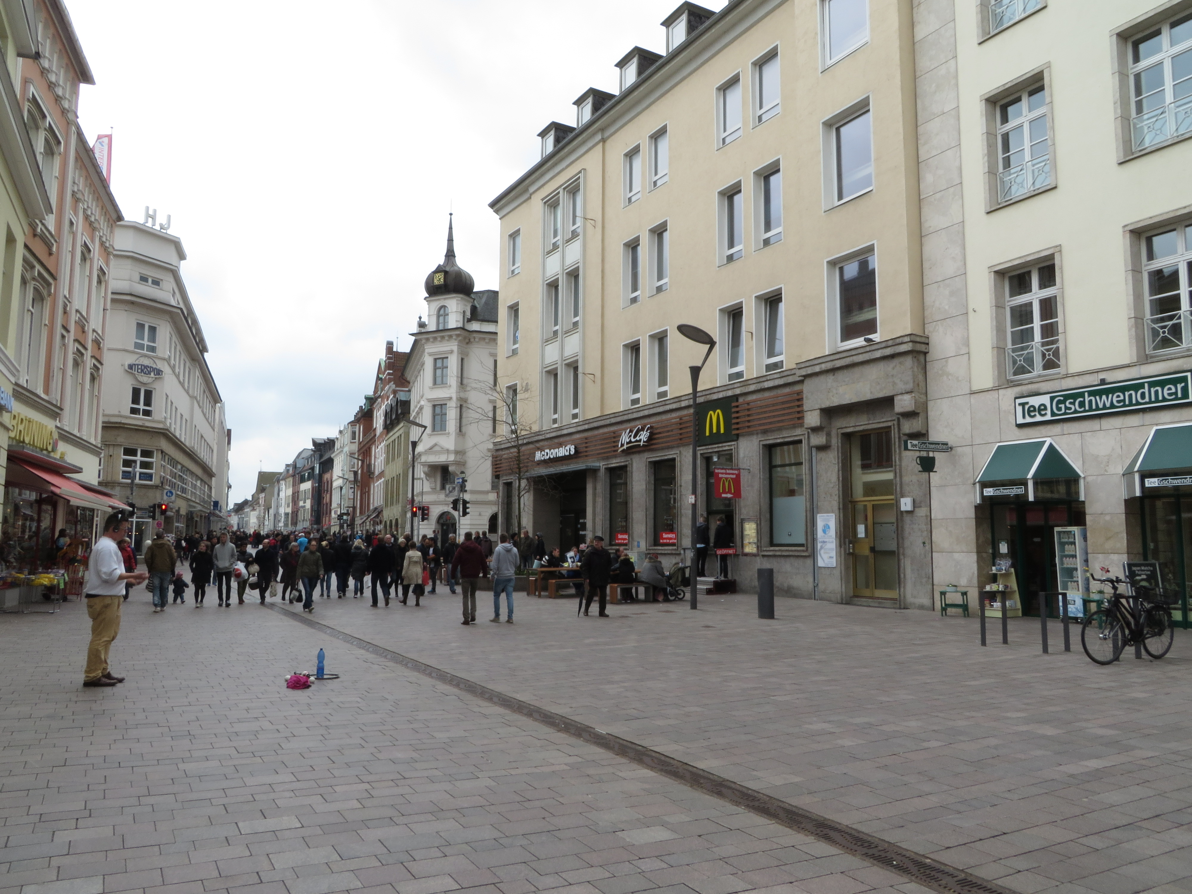 Beim Thingplatz (Flensburg), Bild 01